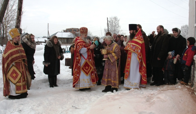 Празднование дня памяти священномученика Василия Константинова-Гришина. с.Кудеиха